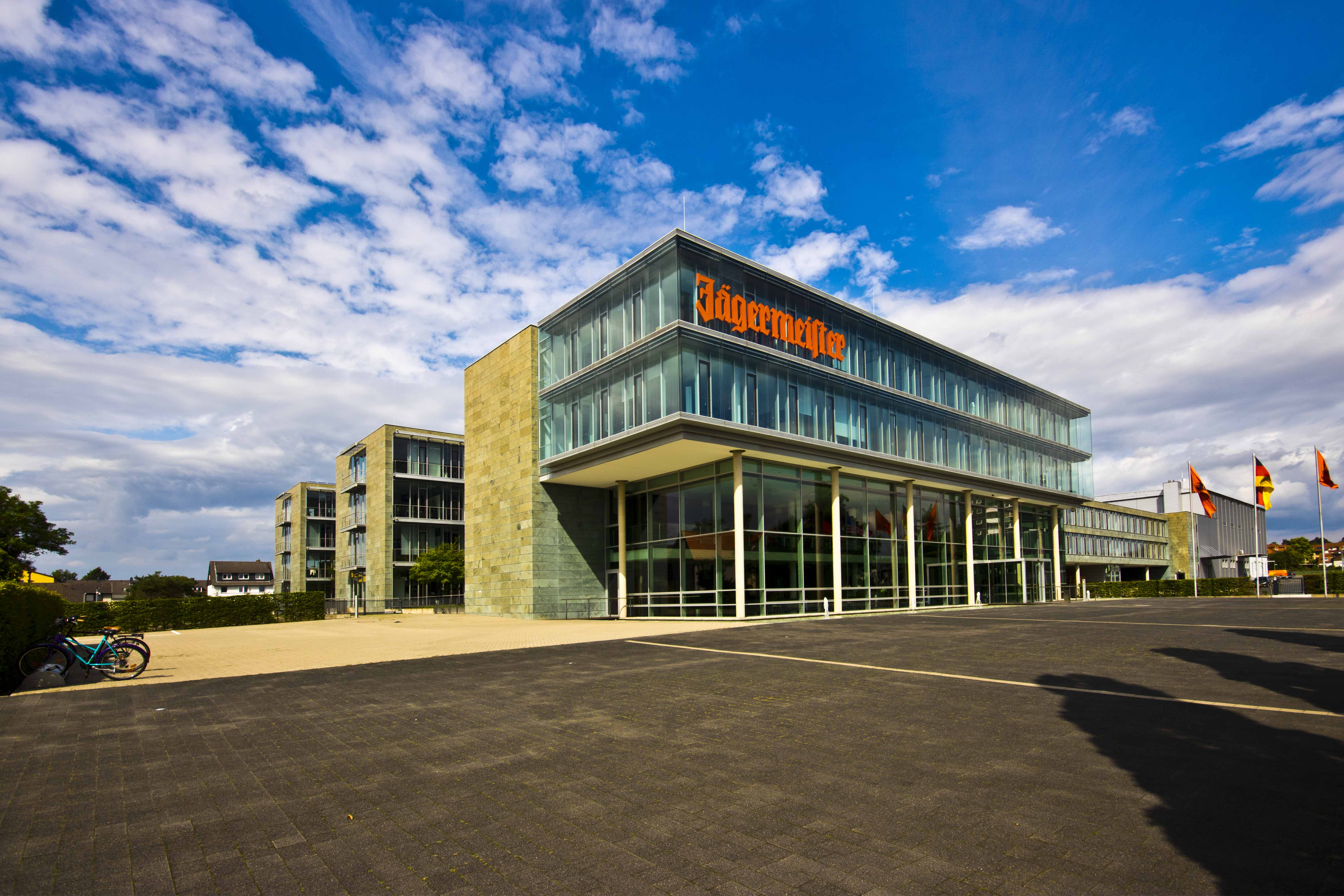 Jägermeister Hauptsitz Wolfenbüttel